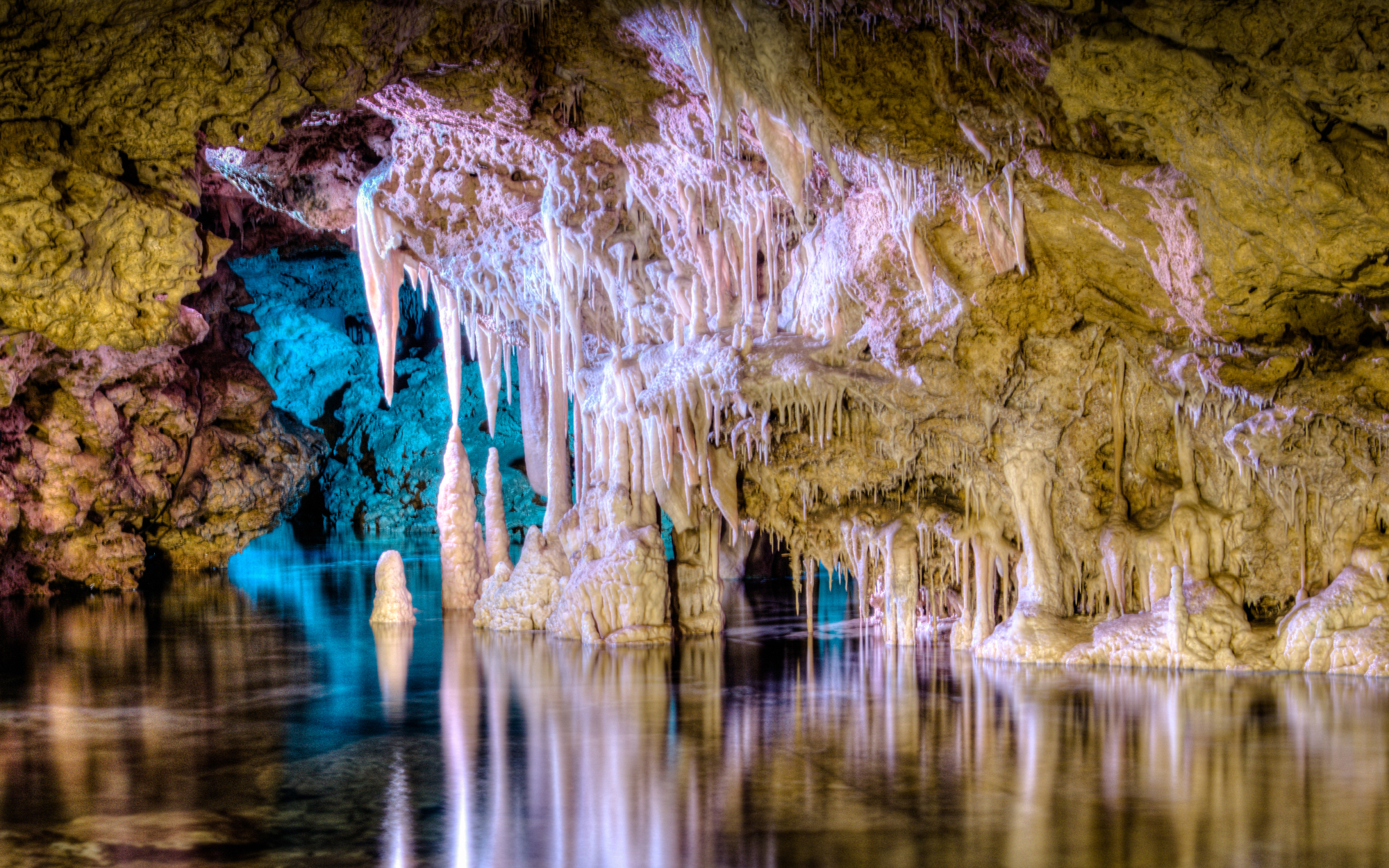 Sala "Mar de Venecia", donde se realiza el espectáculo musical.